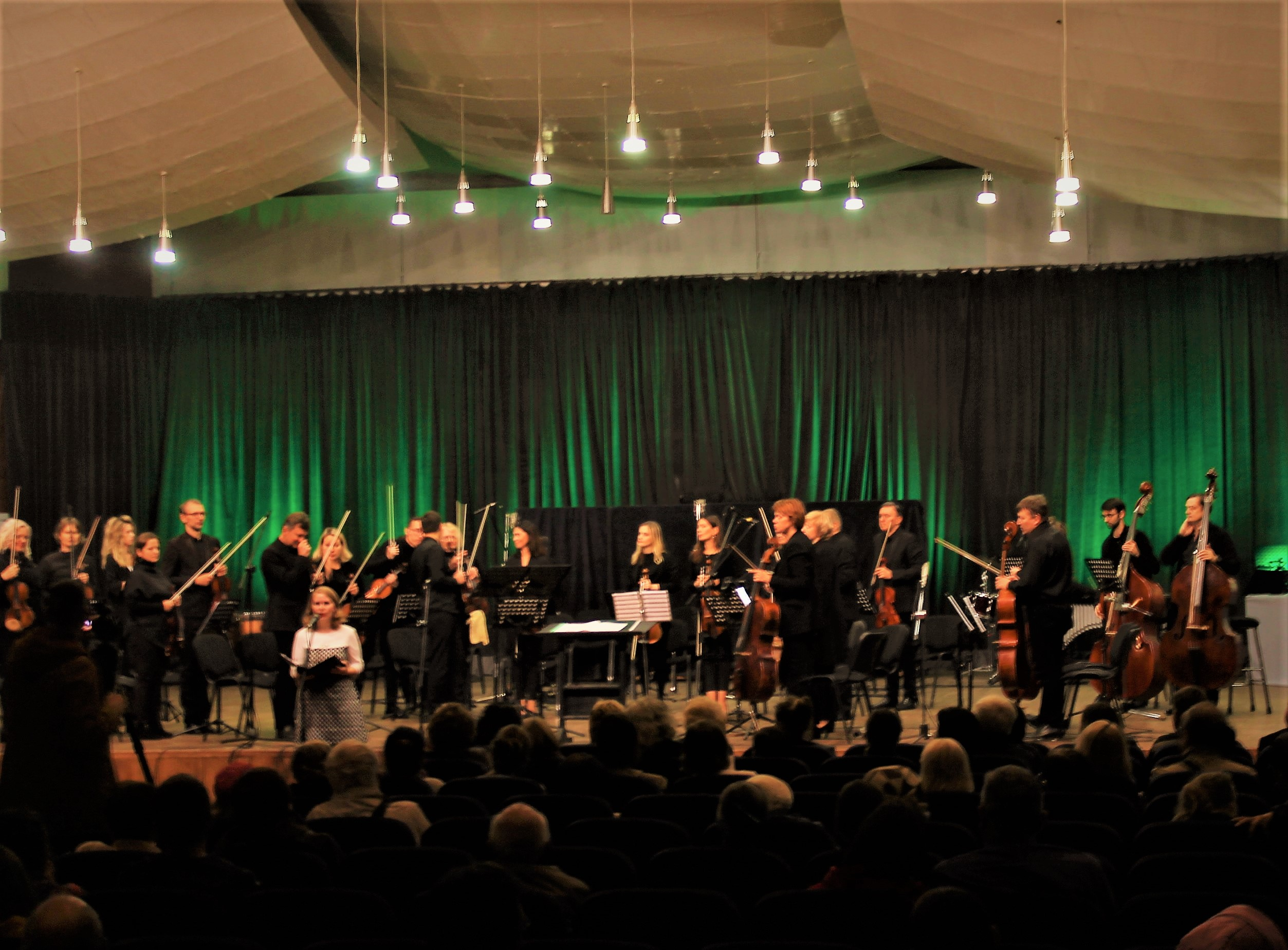 "Київська камерата" в БЗЗ, концерт в рамках фестивалю Левка Колодуба